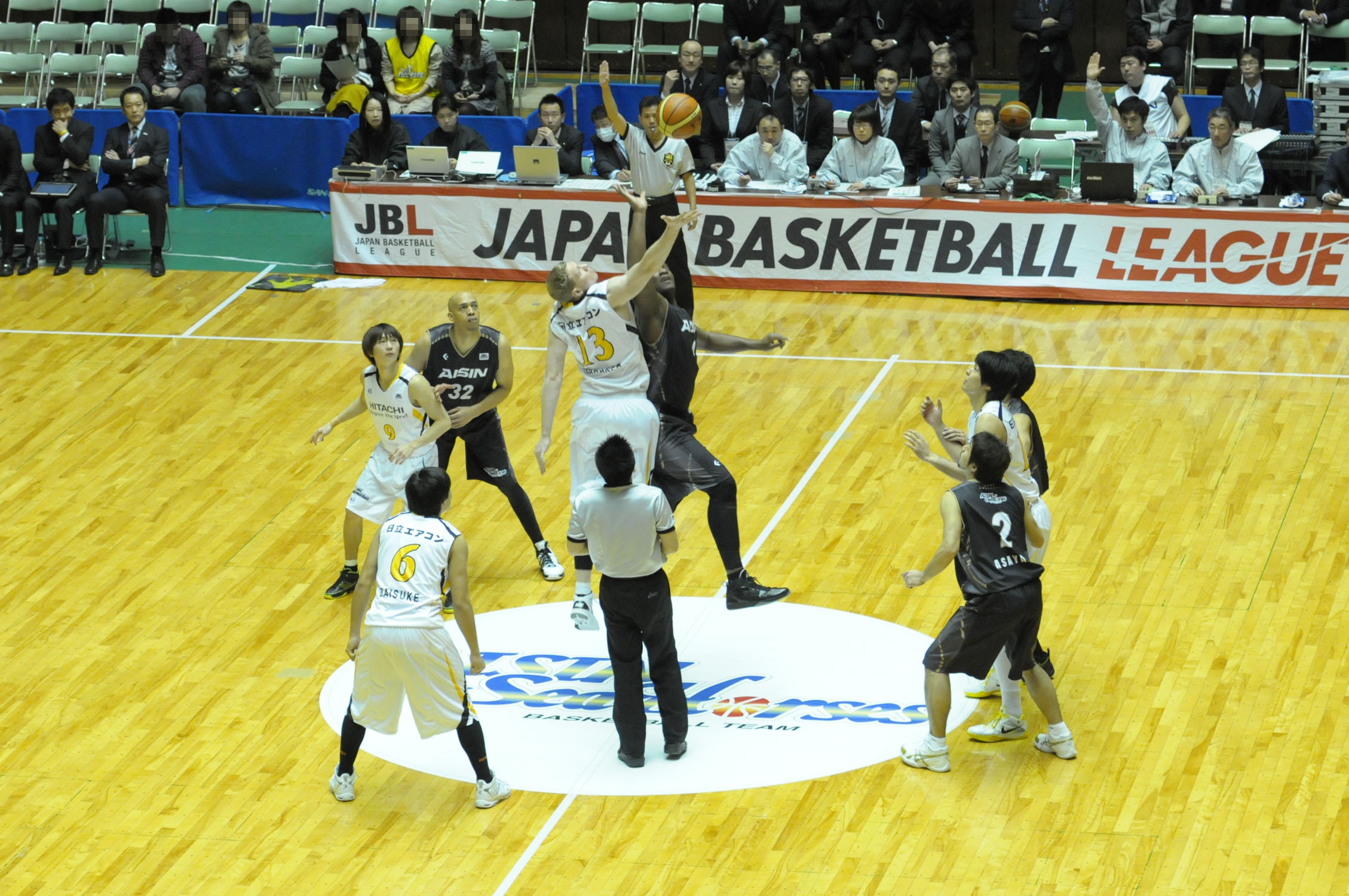 JBL 2011-2012シーズン、アイシンシーホース対日立サンロッカーズ。秋田県立体育館で。